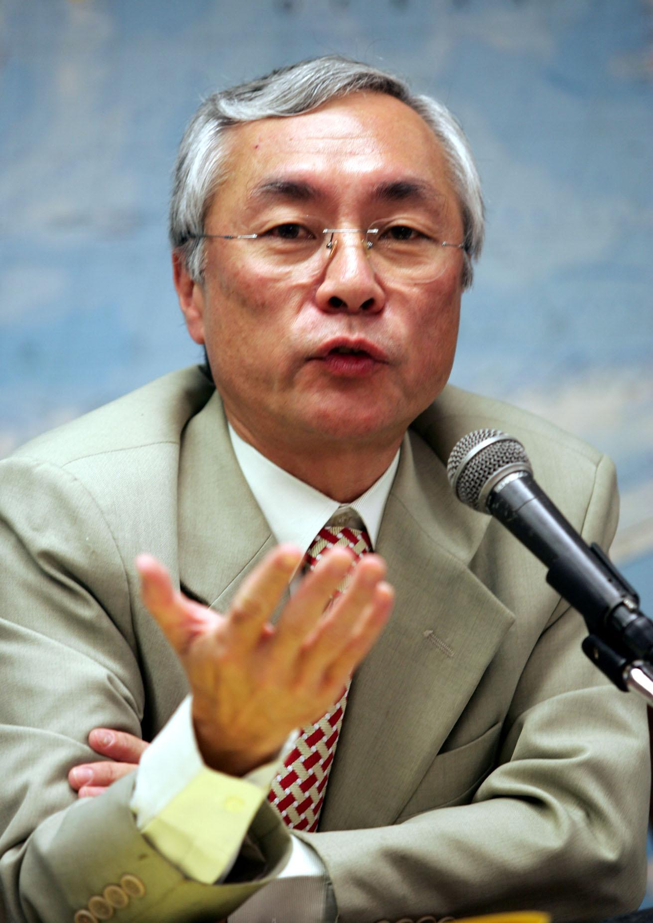 Brasília - Embaixador Edmundo Fujita, diretor do Departamento da Ásia e Oceania, fala sobre ás atividades de assistência a brasileiros no sul da Ásia, e ajuda humanitária. Local: Itamaraty.